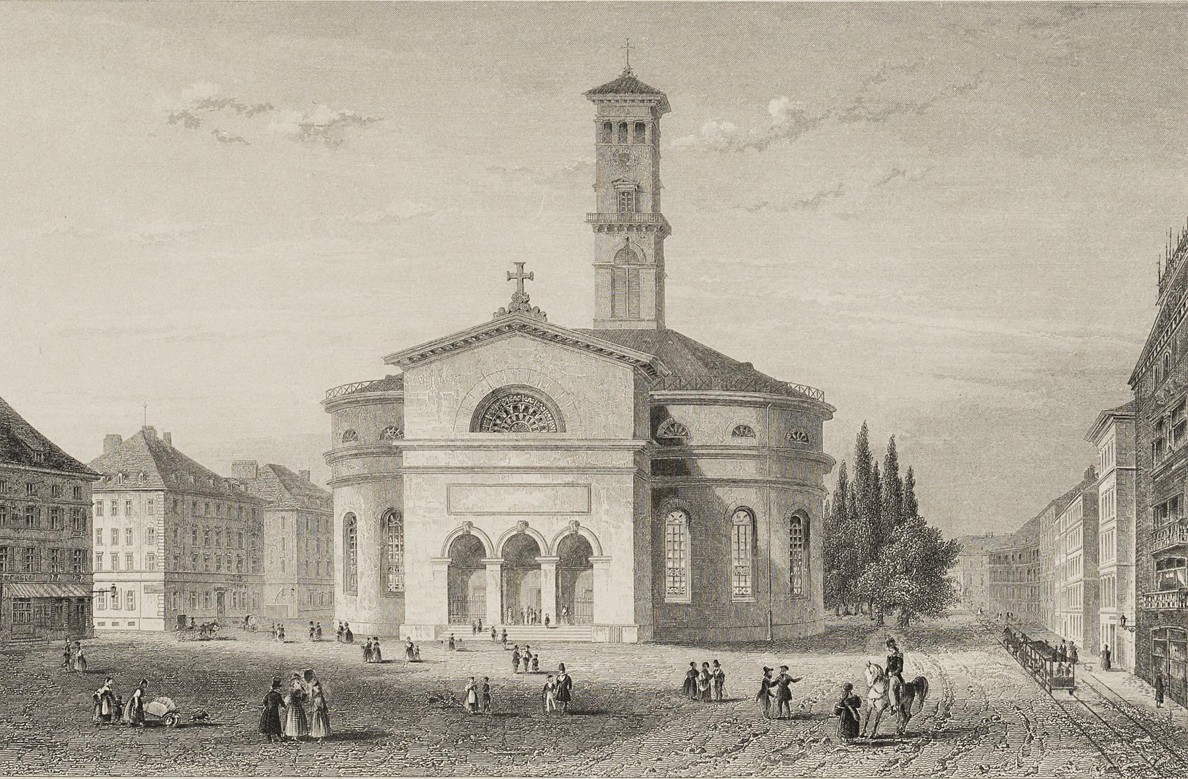 Johann Gabriel Friedrich Poppel - Ansicht der Protestantischen Matthäuskirche zu München, Stahlstich auf Papier, 10,3 x 16 cm